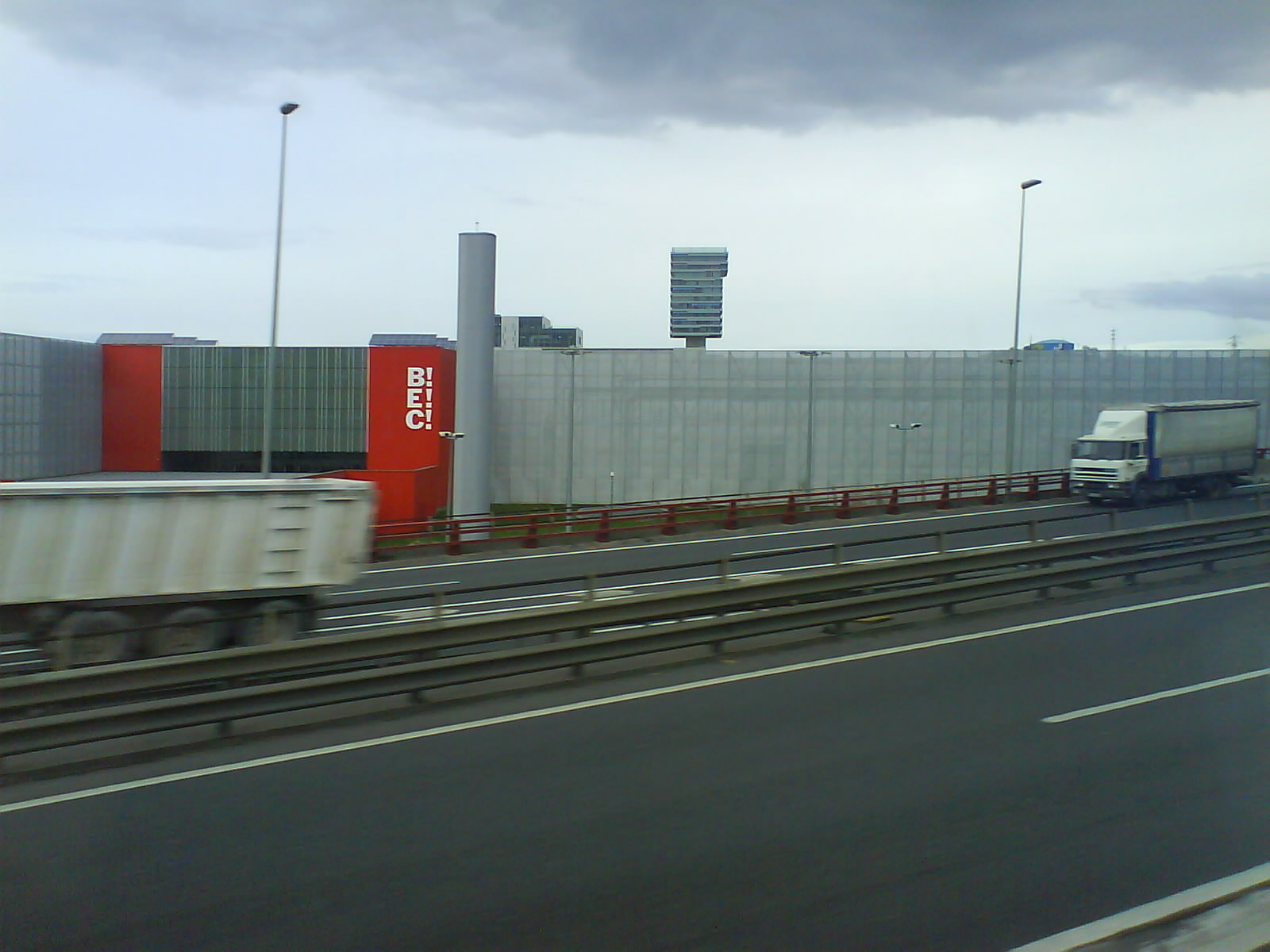 BEC Bilbao Exhibition Centre Bilboko azoka internazionala Ansio